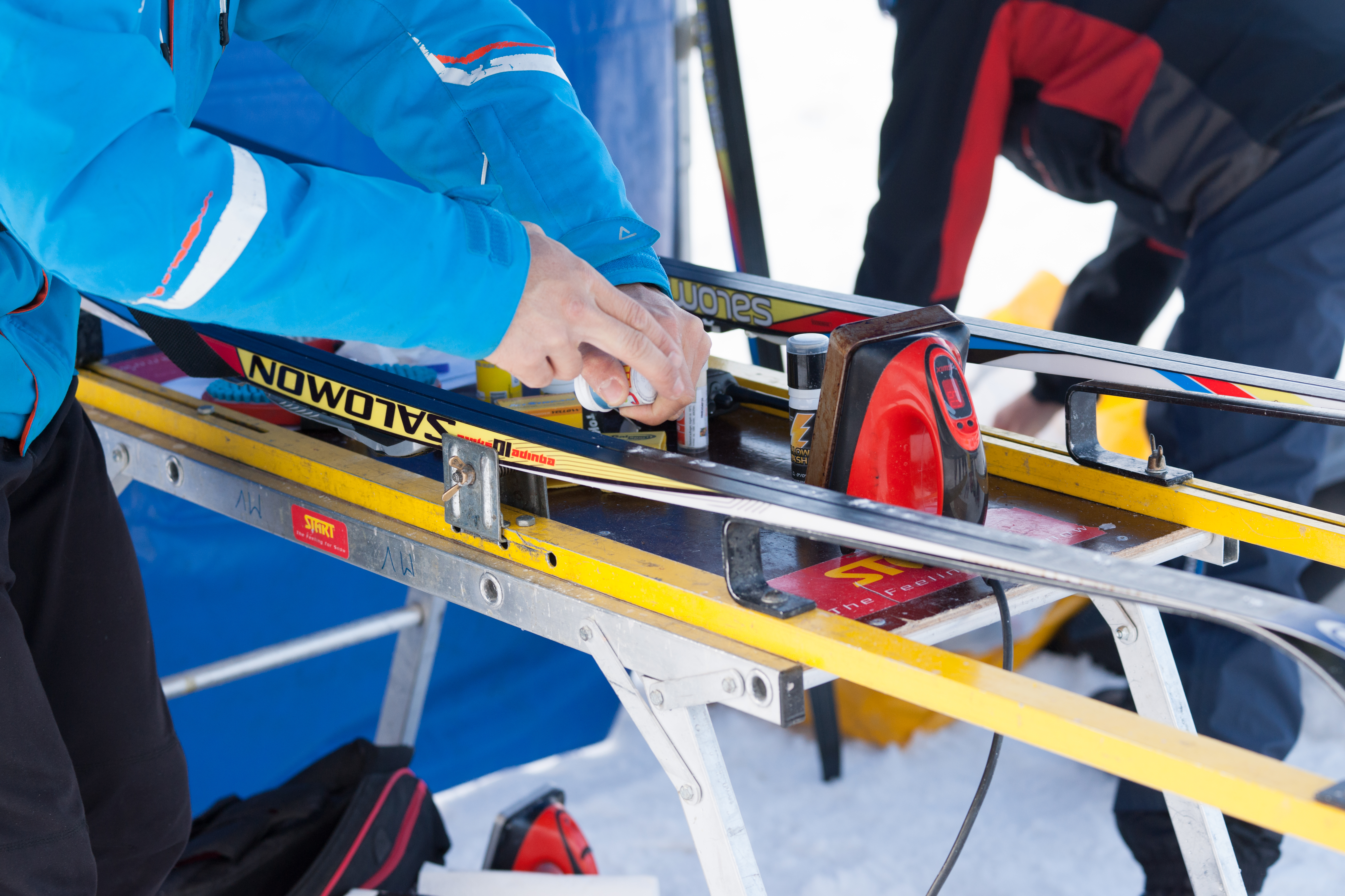 Samse National Tour FFS 5 - La Seigne - Février 2015 - Fart